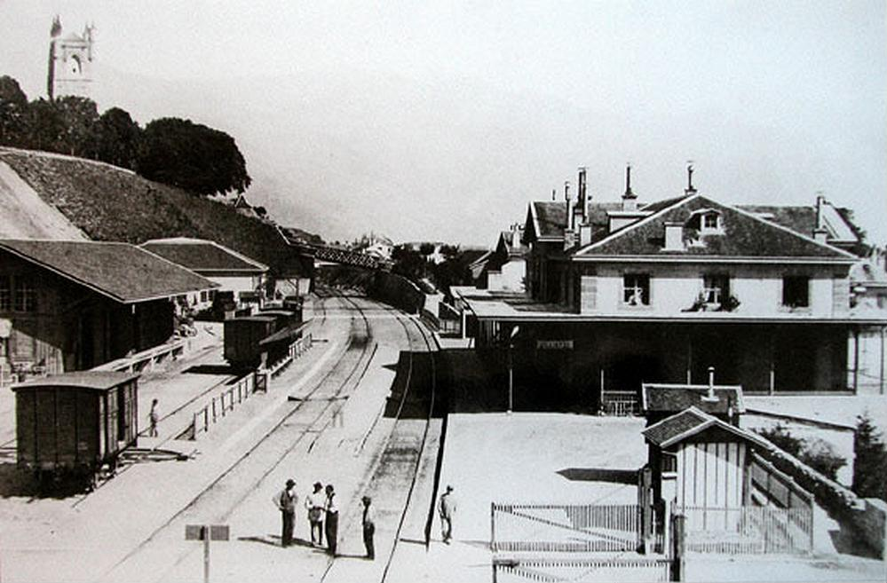 Bahnhof Vevey vor dessen Erweiterung in den Jahren nach der Jahrhundertwende: 1902 wurde die Chemins de fer éléctriques Veveysans (CEV) in den Bahnhof eingeführt, zwei Jahre später folgte die Linie Vevey–Puidoux-Chexbres (VCh).